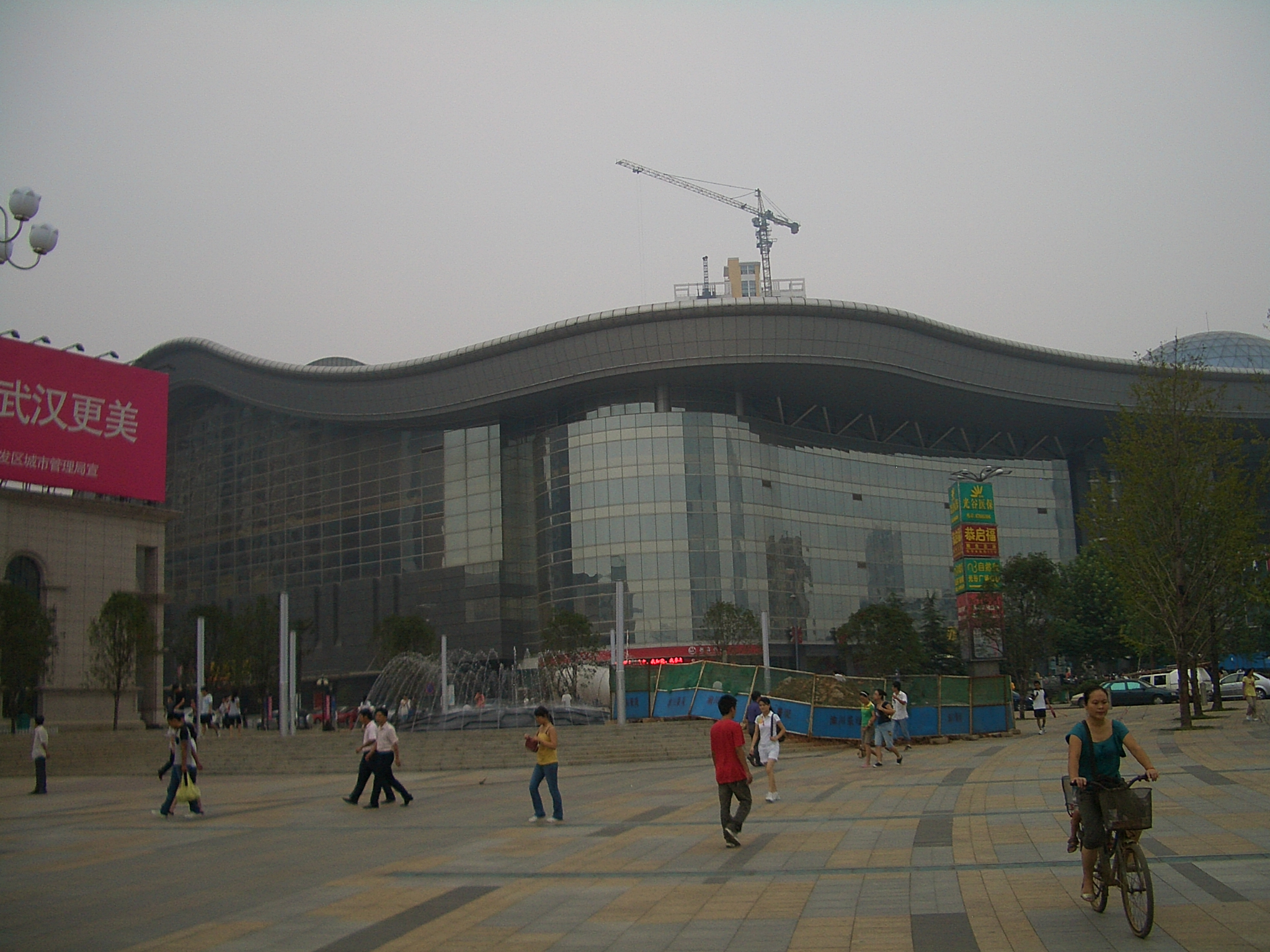 Guanggu Square, Wuhan